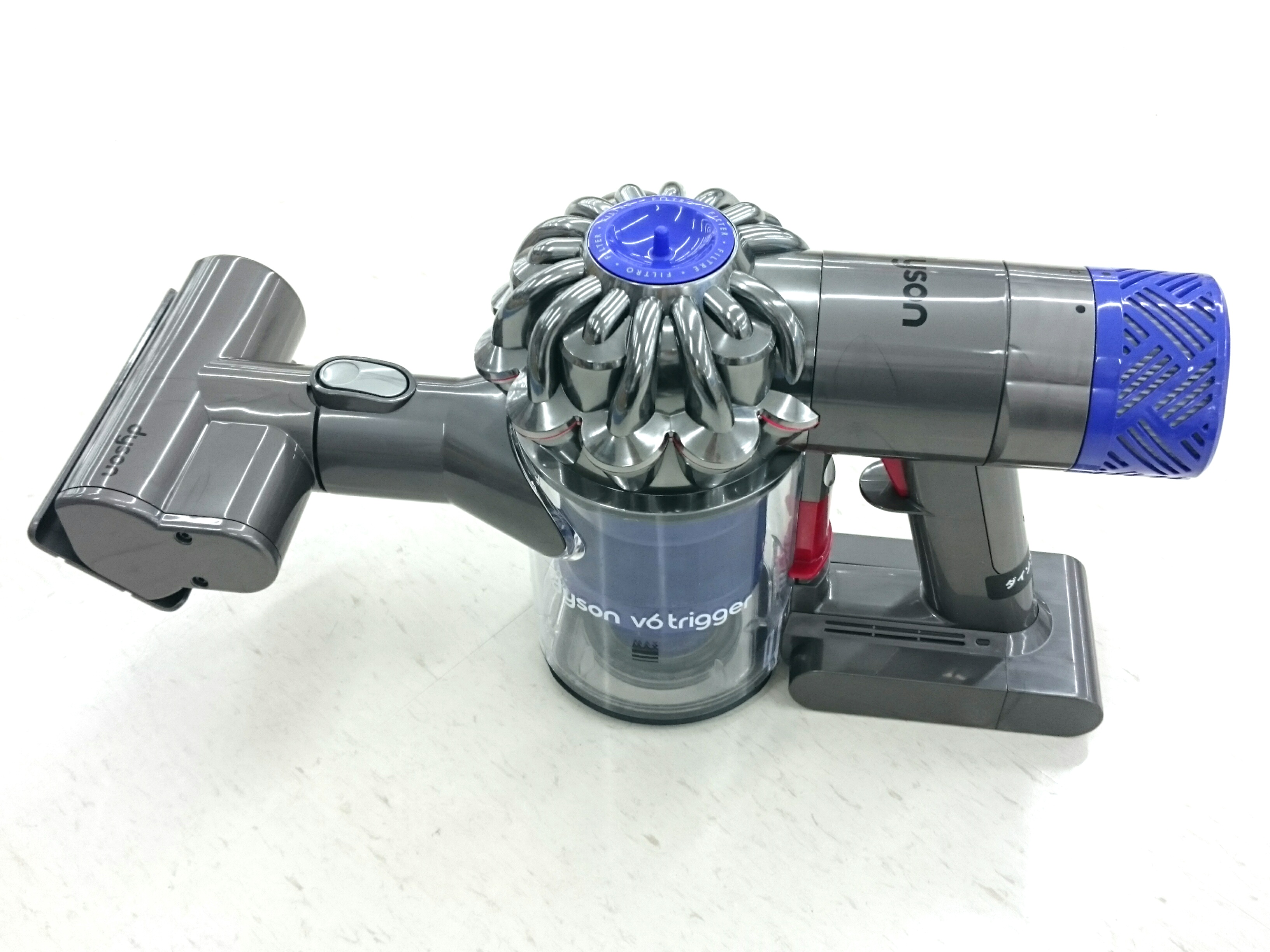 ダイソン製掃除機「HH08MH」。